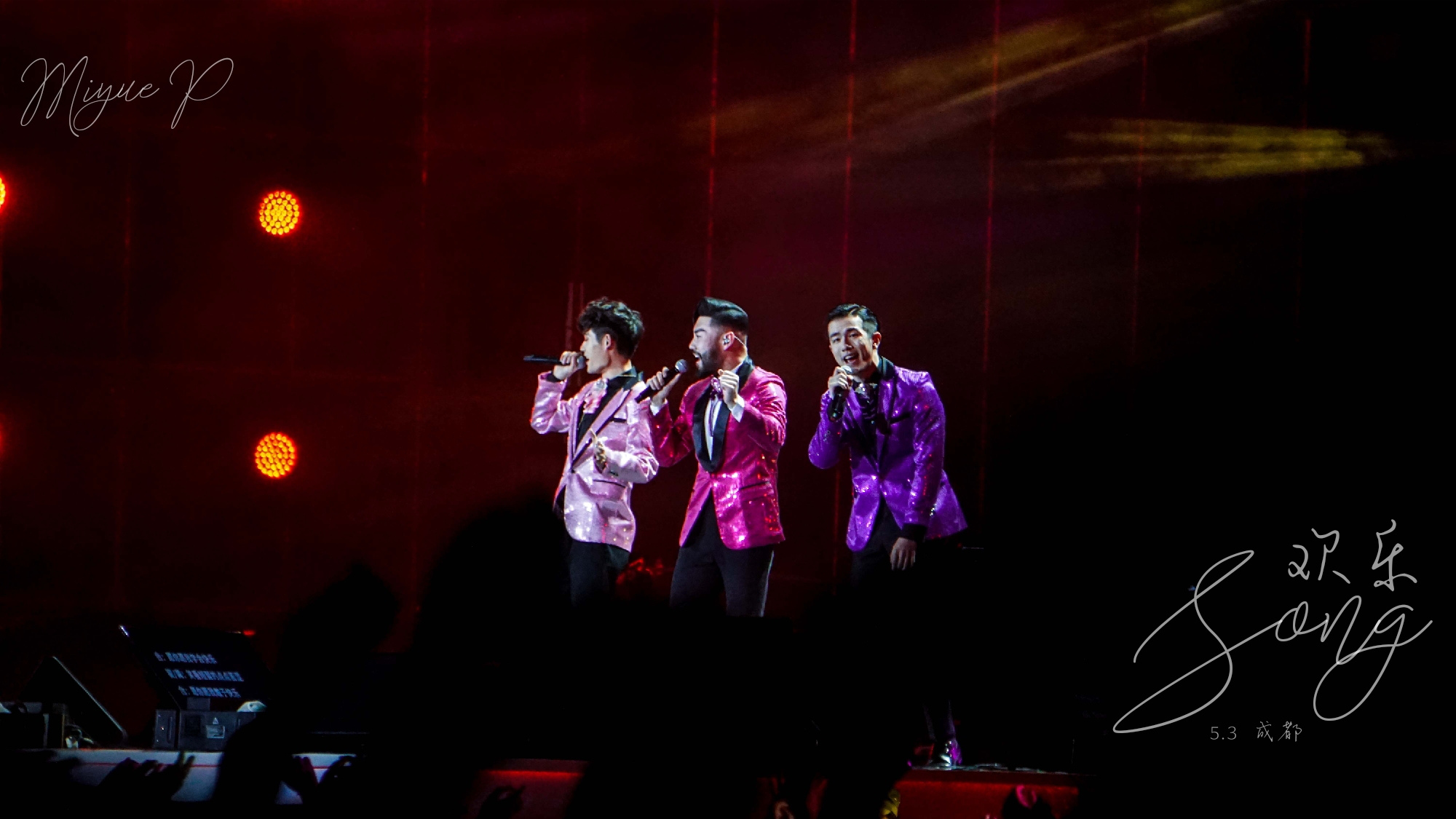 中文（中国大陆）: 《声入人心》成员参加成都音乐盛典保利art音乐节